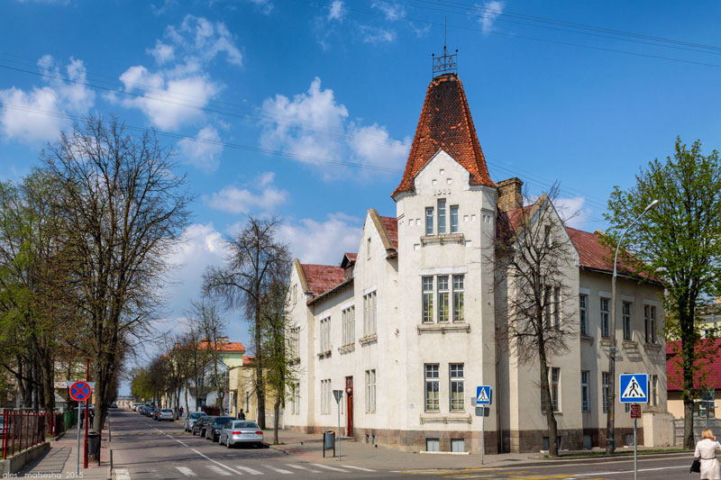 Гродна. Дом урача Тальгейма